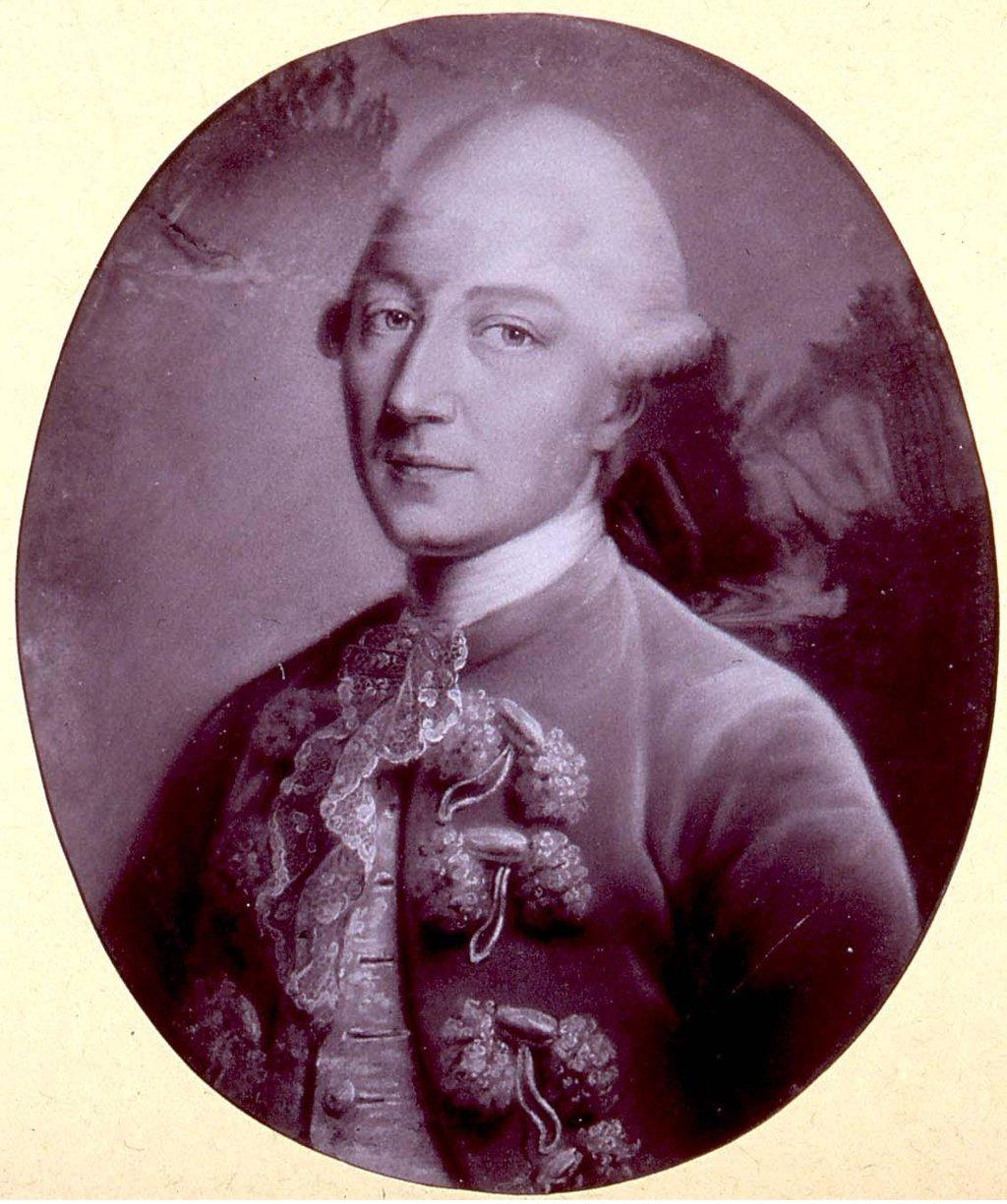 Baron de Berckheim de Lœrrach